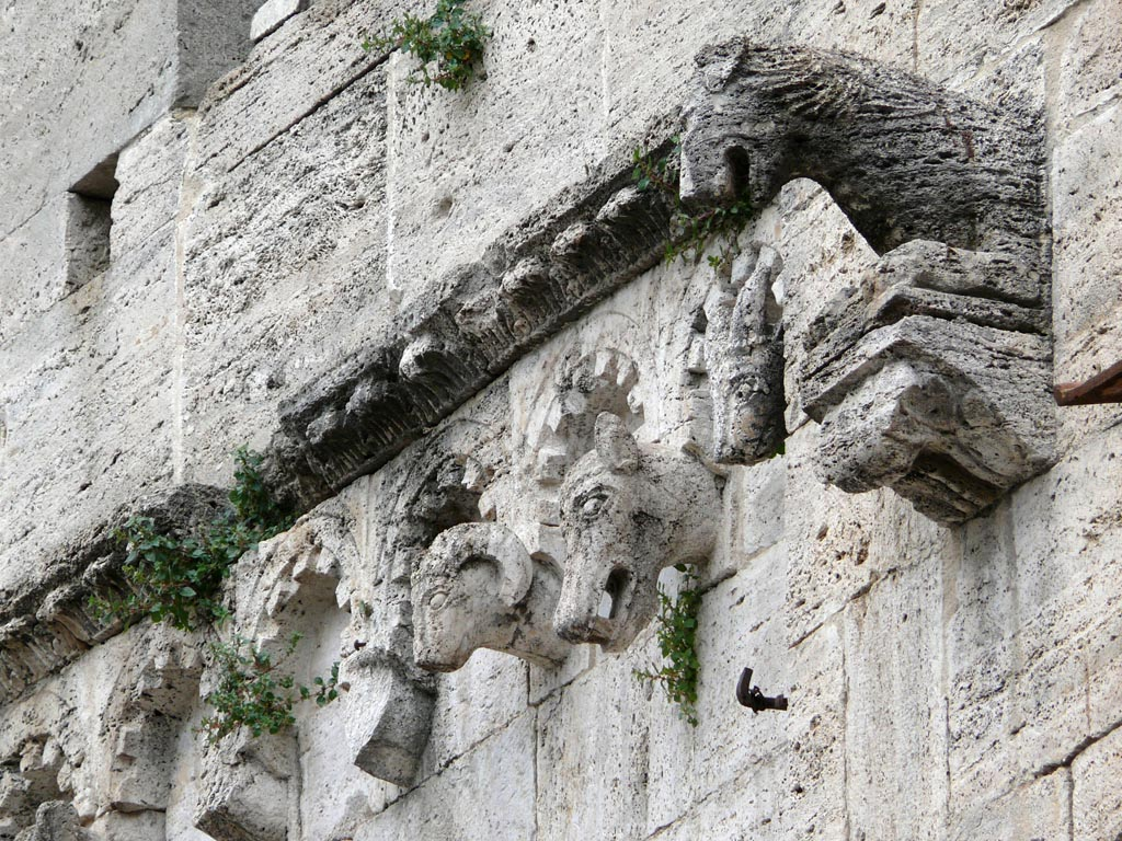 Bevagna, San Michele Arcangelo, facade - detail